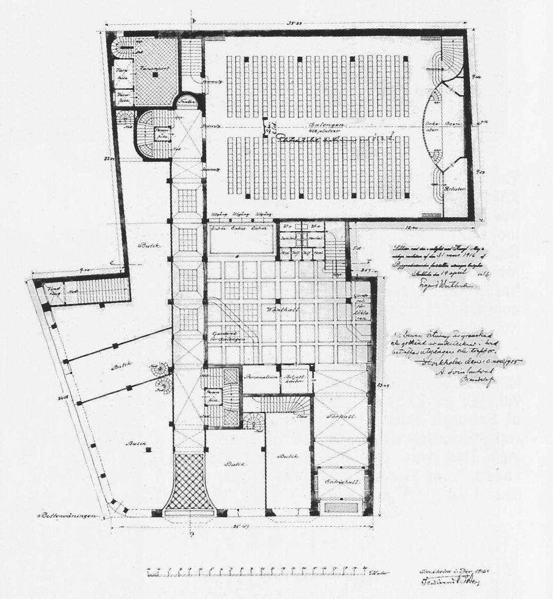 NK:s kontorshus, Regeringsgatan 5-7 (invigd 1919), Bobergs planritning bottenvåning